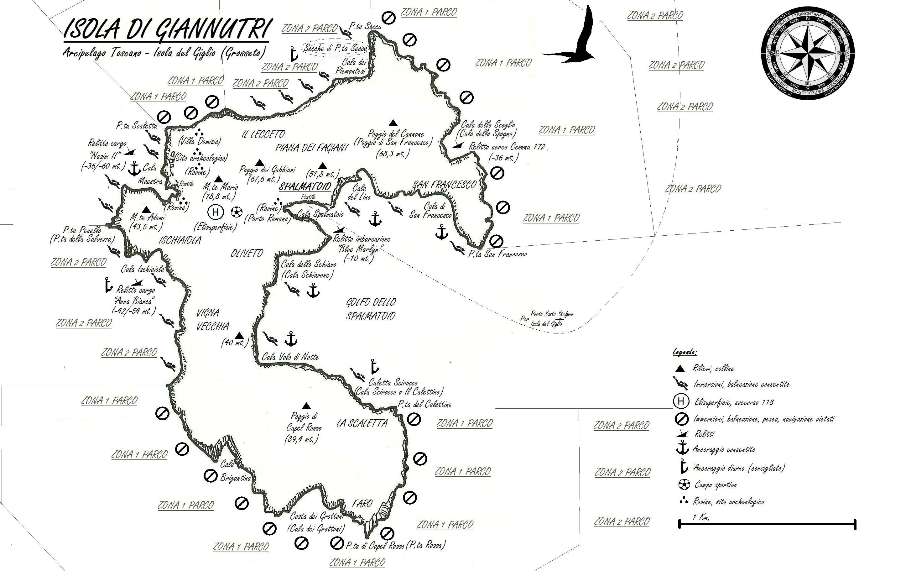 mappa di Giannutri